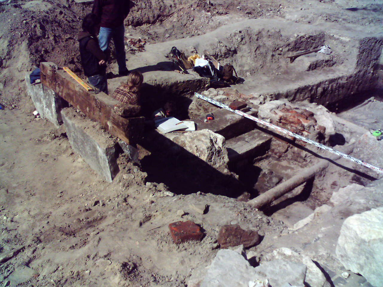 Площа Ринок, Львів